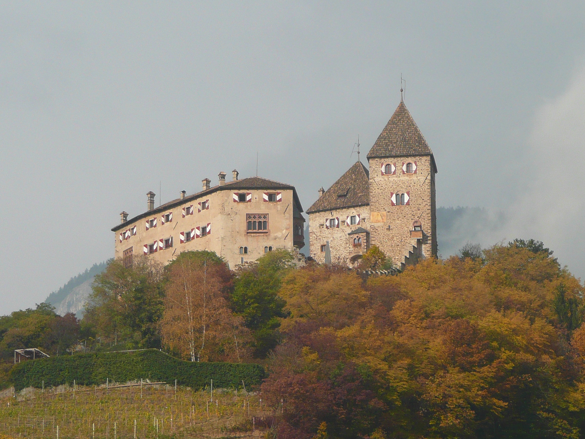 Castello di S. Erasmo